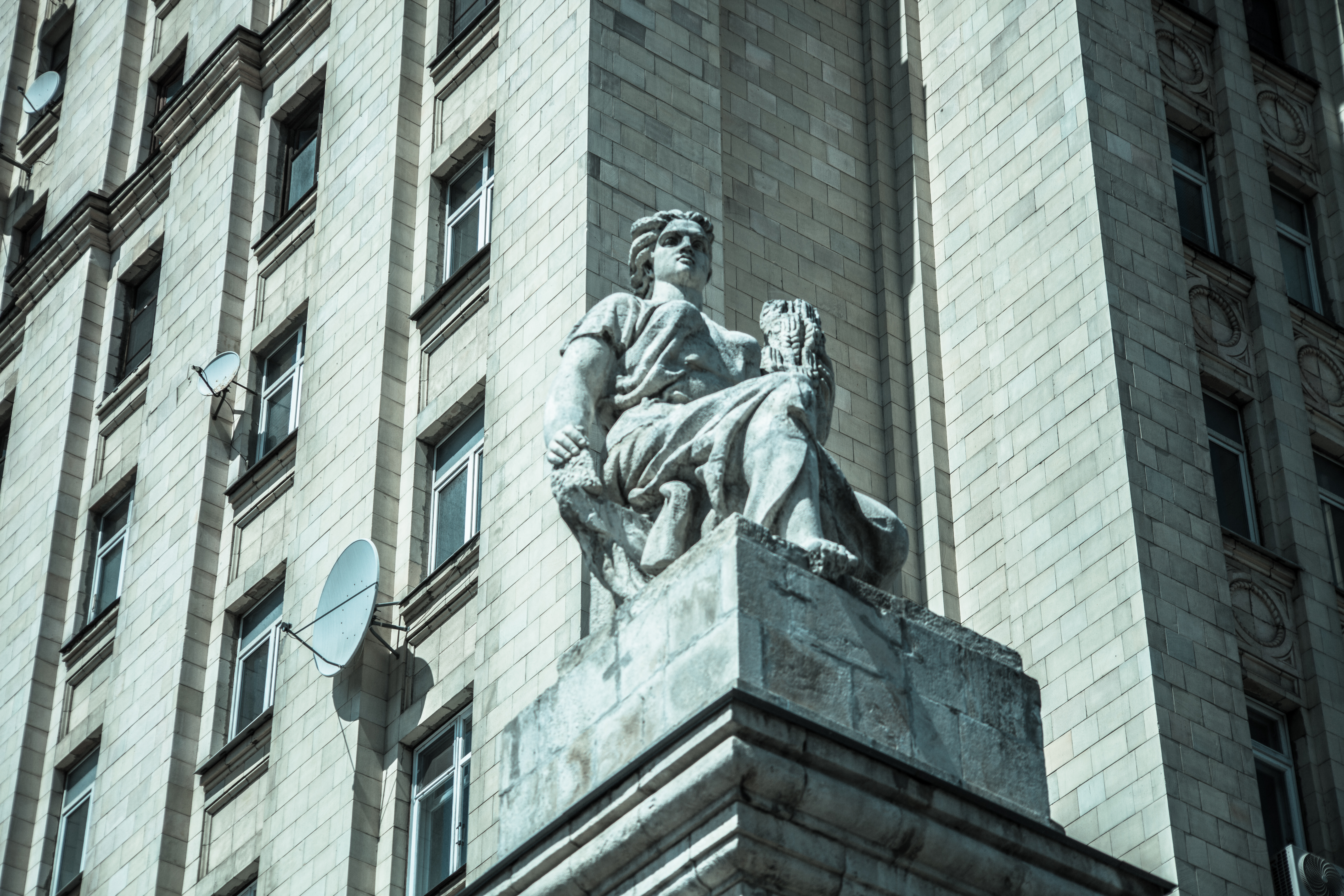 Сталинская высотка на «Баррикадной»